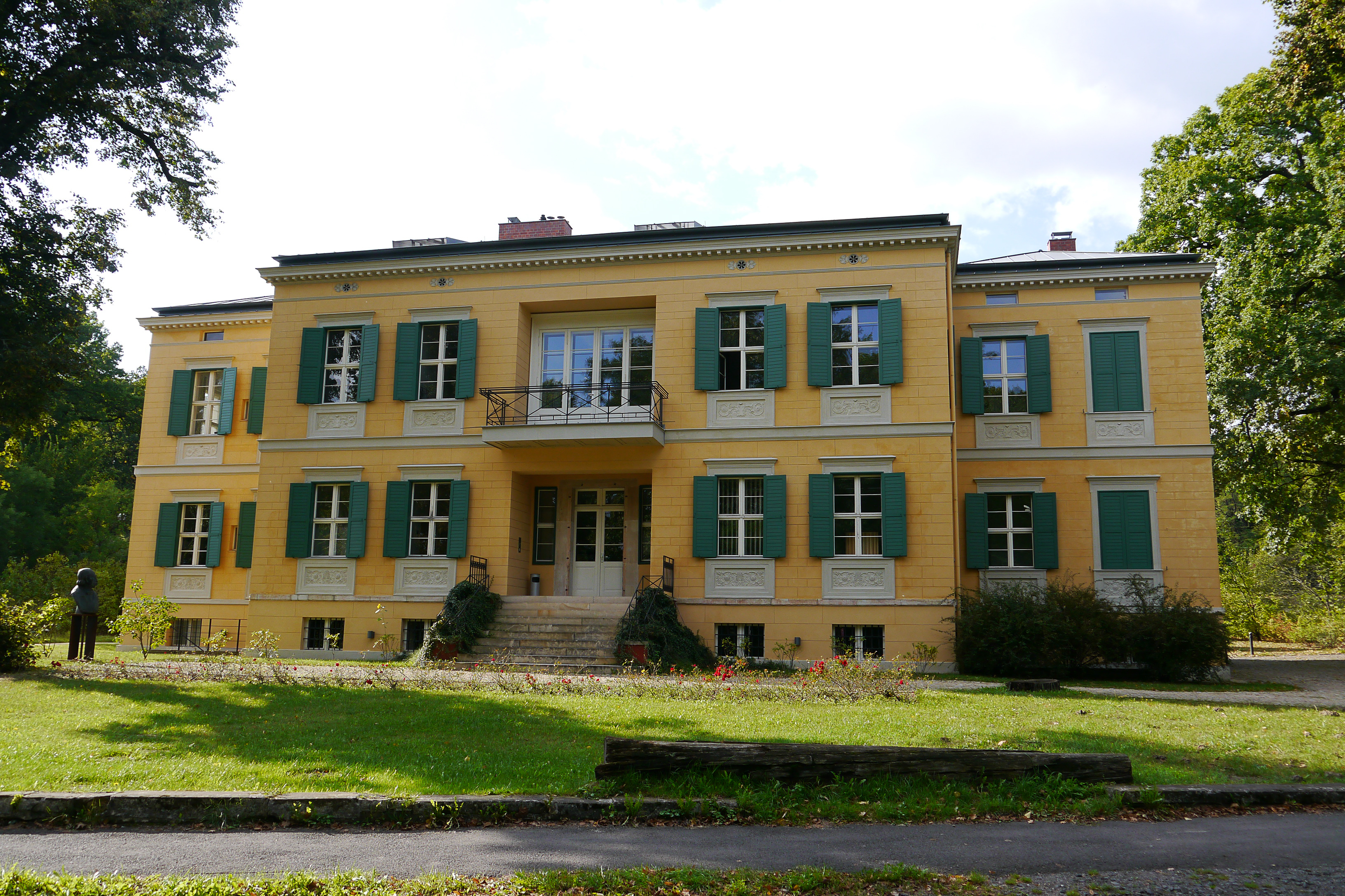 Baudenkmal: Potsdam, Villa Quandt